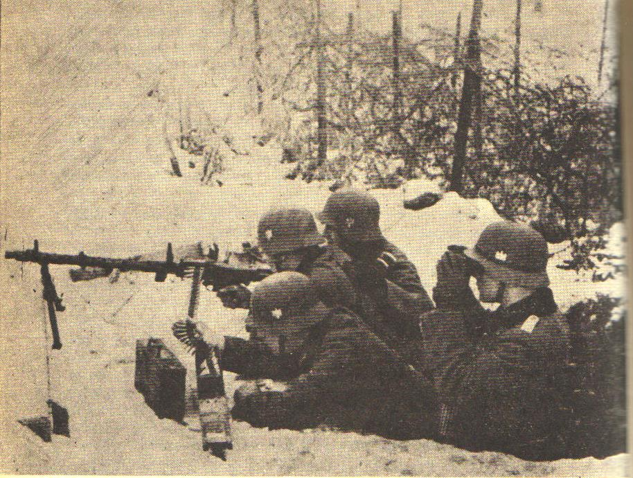 Soldados alemanes luchando en suelo ruso durante el invierno de 1941-1942